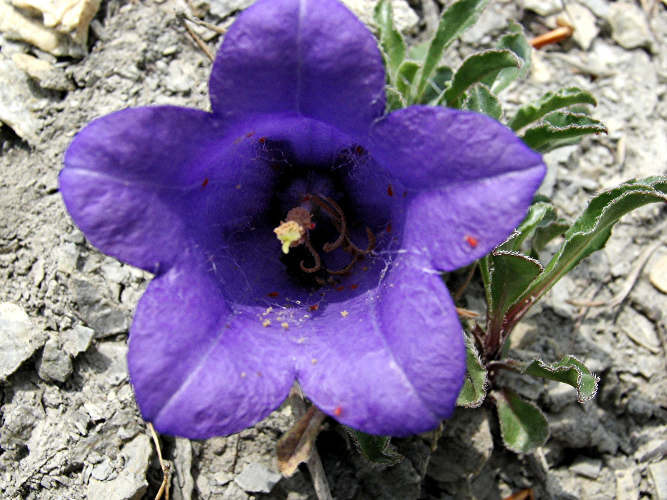 Campanula alpestris, Massif du Vercors (France)